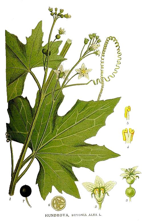 Original Description Hundrova, Bryonia alba L.